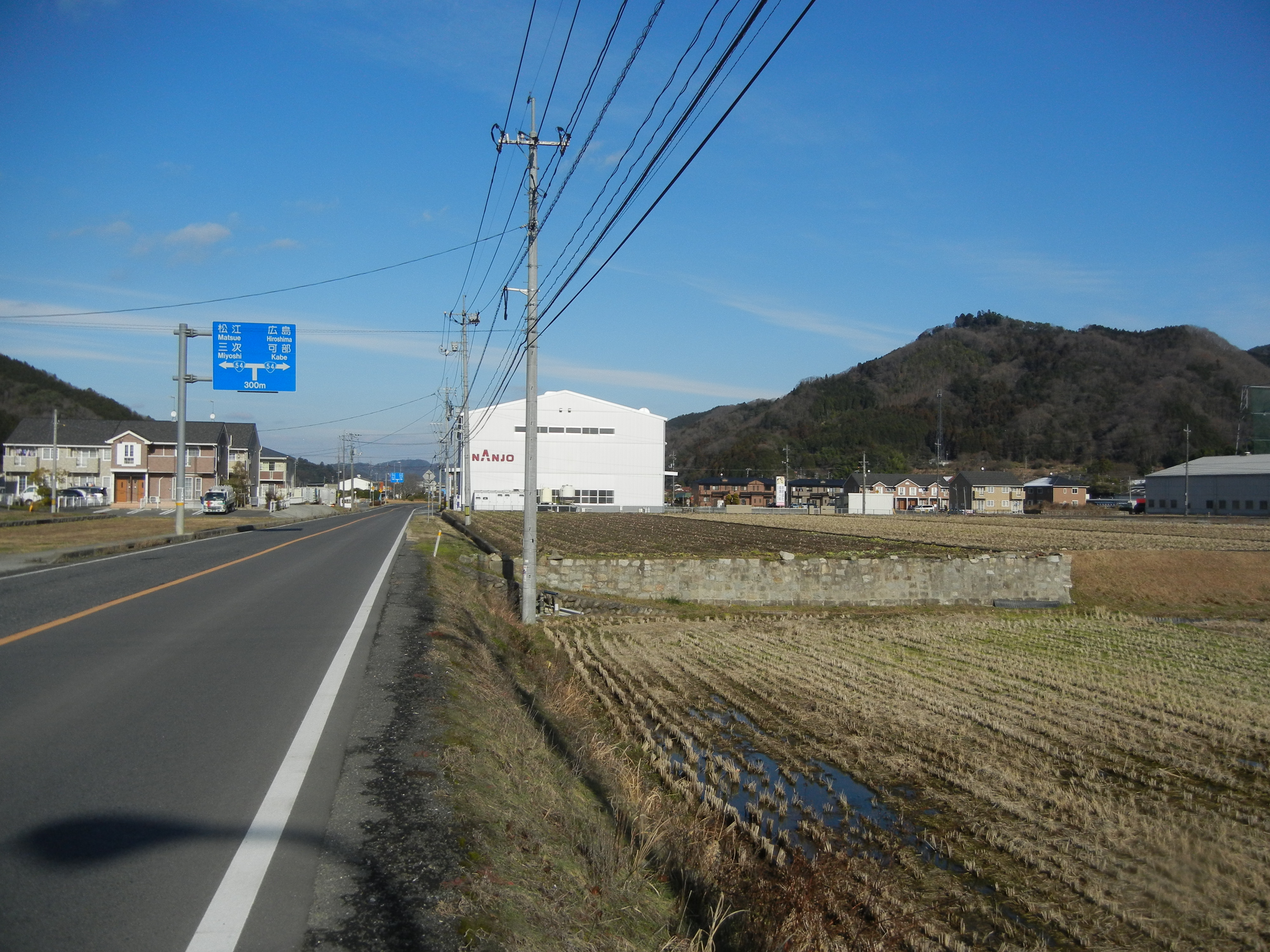 八千代町上根